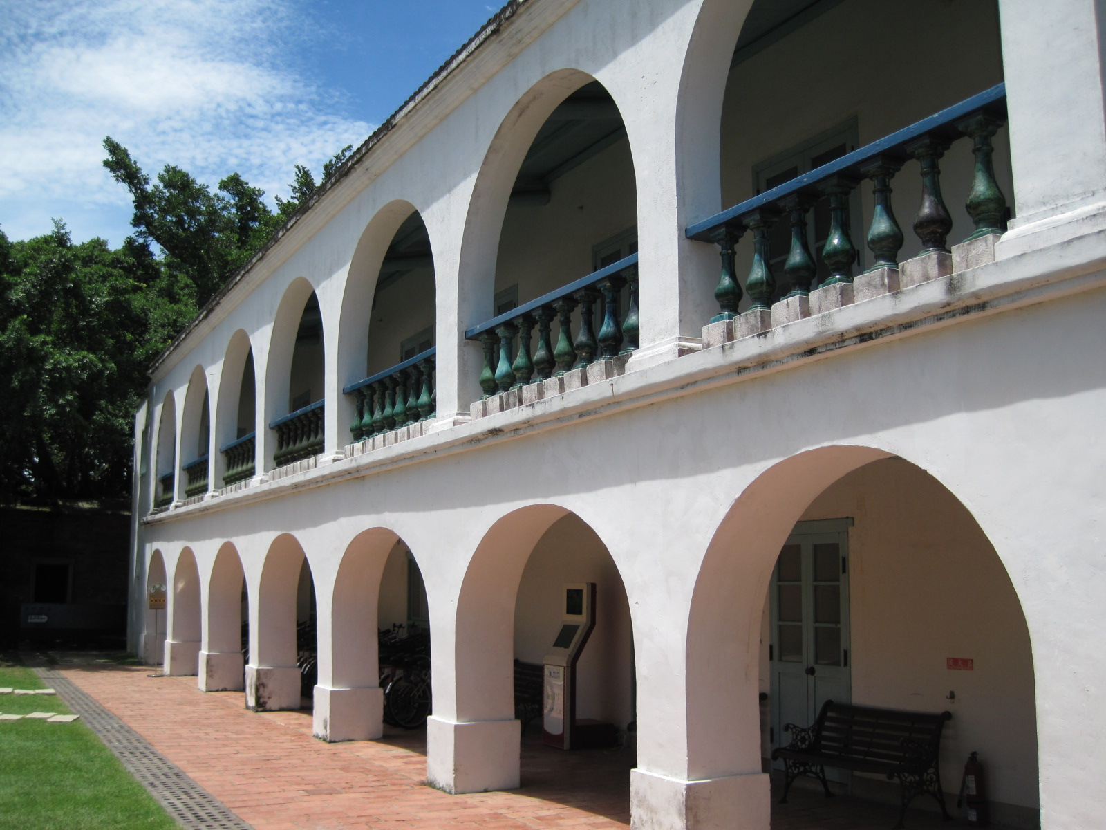 臺南市安平德記洋行側面